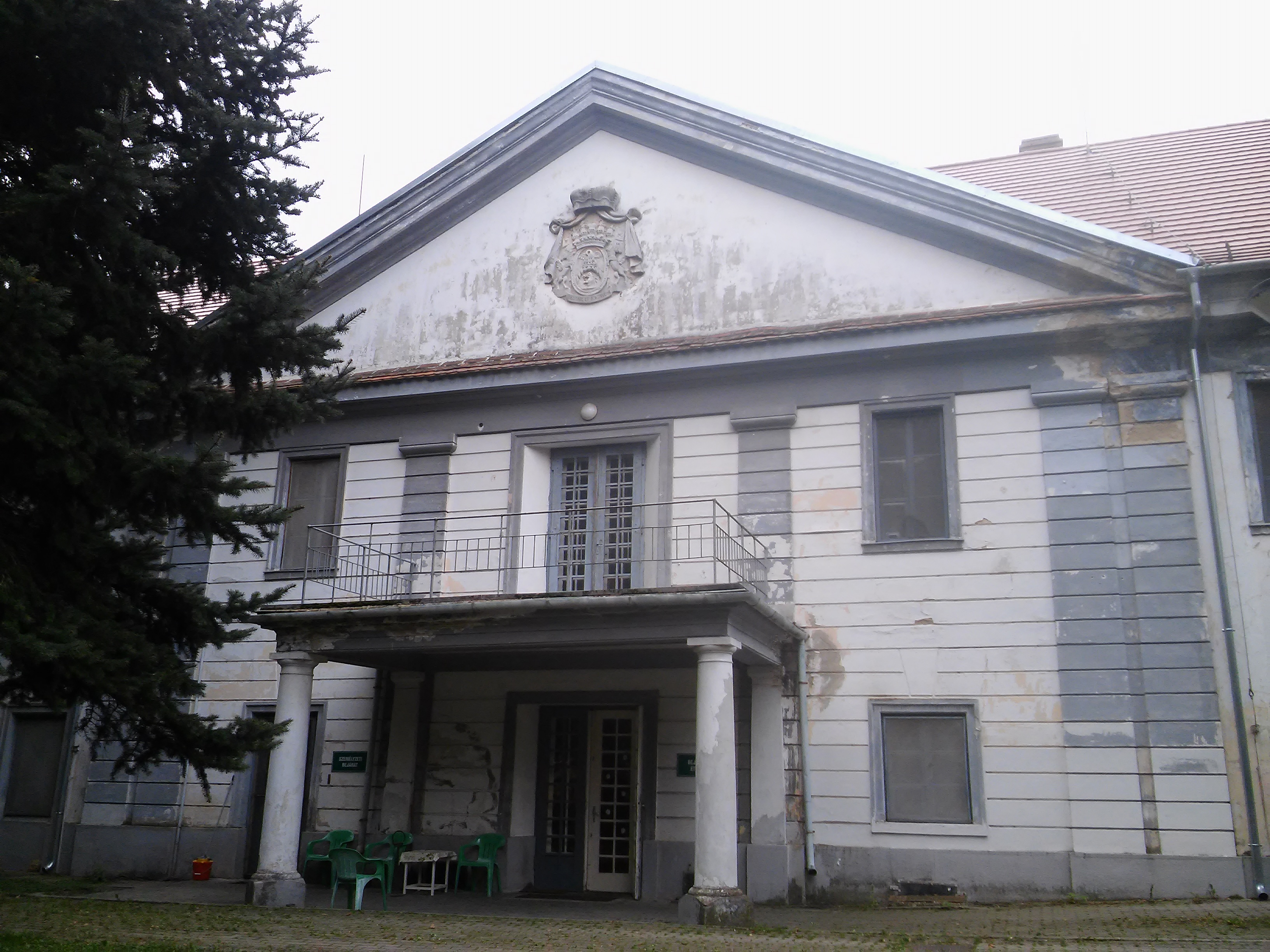 Az intaházai Batthyány-Strattmann-kastély (ma: Pszichiátriai és Addiktológiai Rehabilitációs Központ) főhomlokzatának középrizalitja, a timpanonban a család címere.